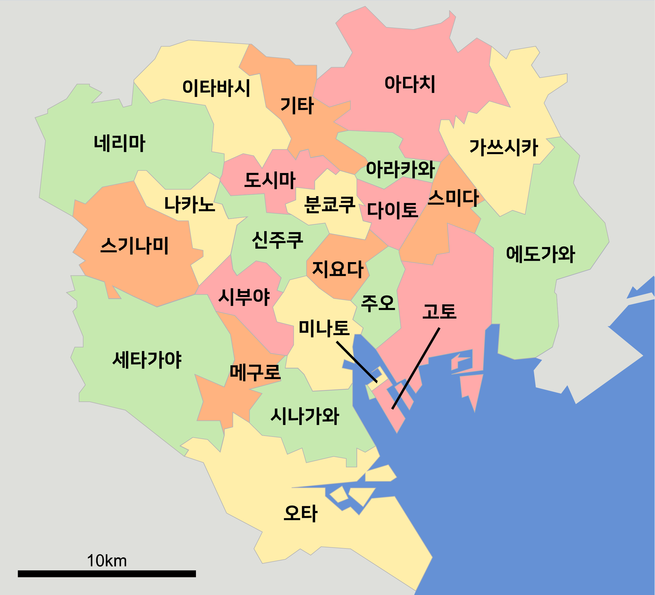 이 한글위키엔 이그림이 없어서 출처는 일본위키이며 도쿄도 23구 지도를 새로 만들었습니다.